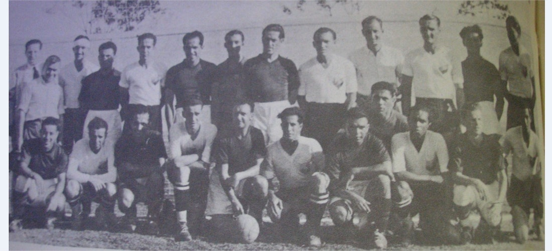 Primera alineación de la selección de fútbol de Venezuela. Ciudad de Panamá, 12 de febrero de 1938